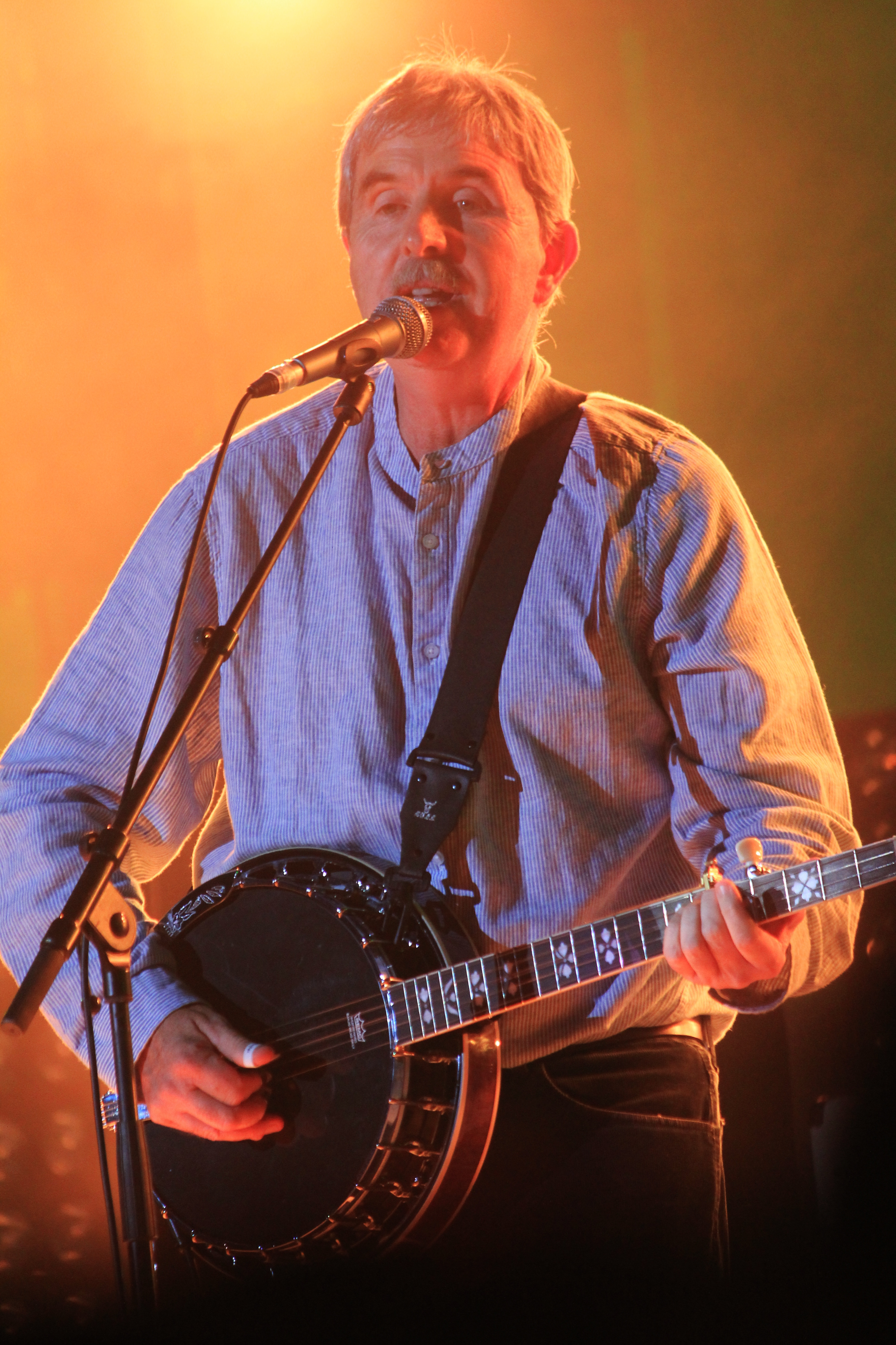 The Dublin Legends en concert au stade du moustoir lors du festival interceltique de Lorient 2014.